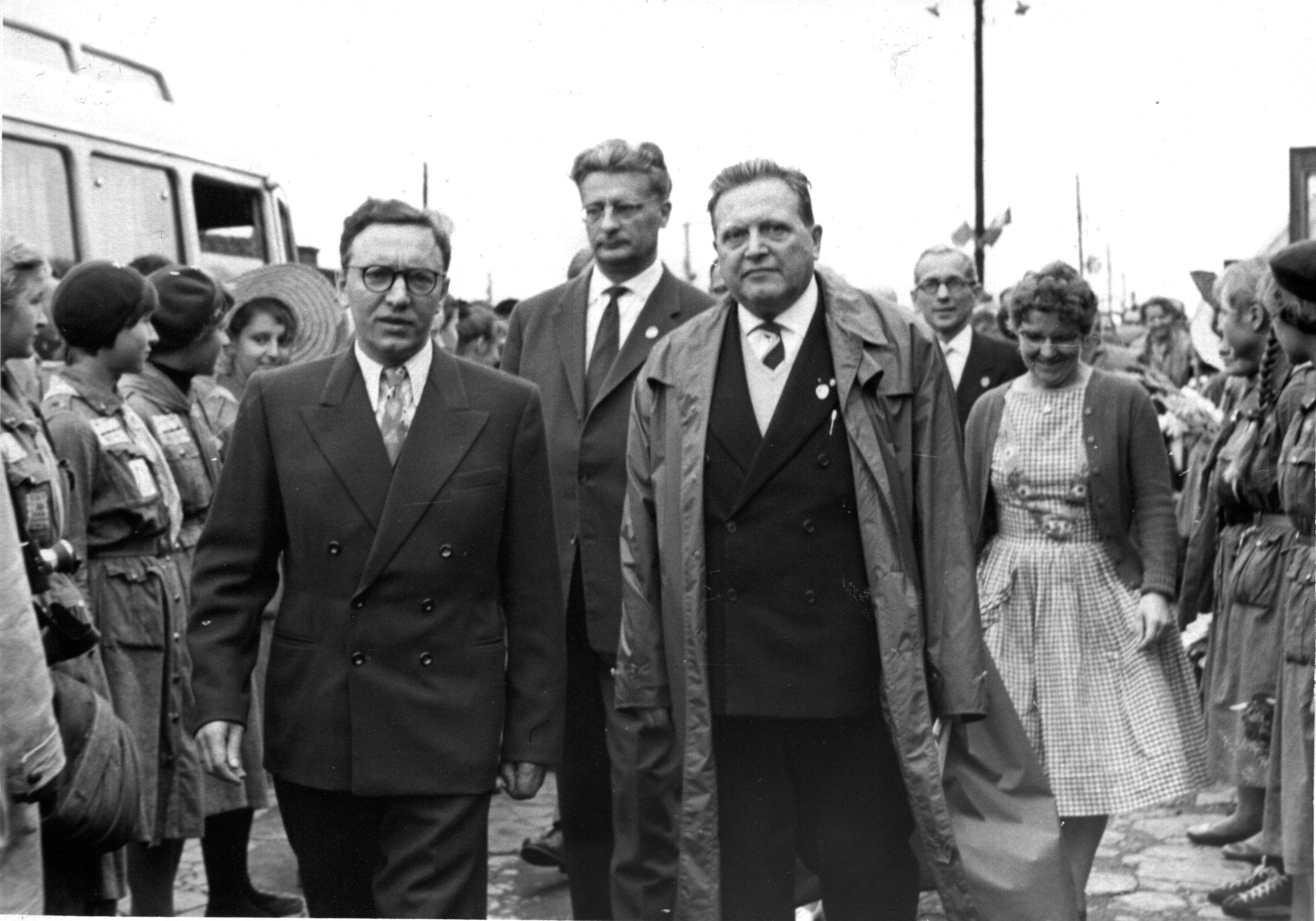 Prof. Giorgio Canuto (po prawej) w towarzystwie p. Korzeniewskiego v-ce przewodniczącego Prezydium M.R.N. (po lewej) w Białymstoku